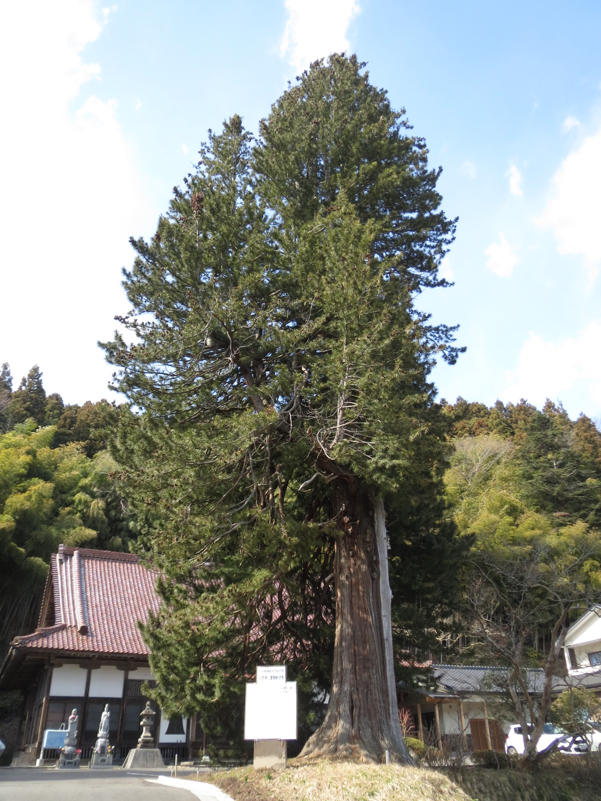 大崎市にある石雲寺コウヤマキ Canon IXY 3